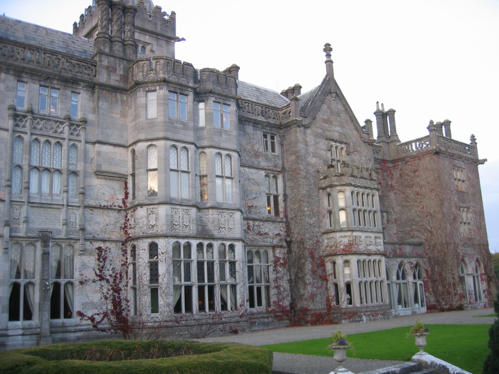 Adare Manor